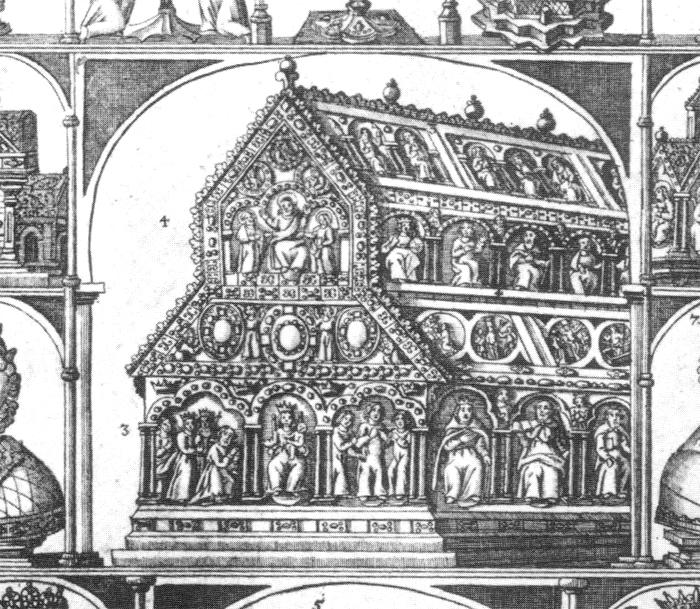 sog. „Schonemann-Blatt“, ein Pilgerblatt mit den Schätzen der Domschatzkammer von 1671 (Ausschnitt: Dreikönigenschrein)